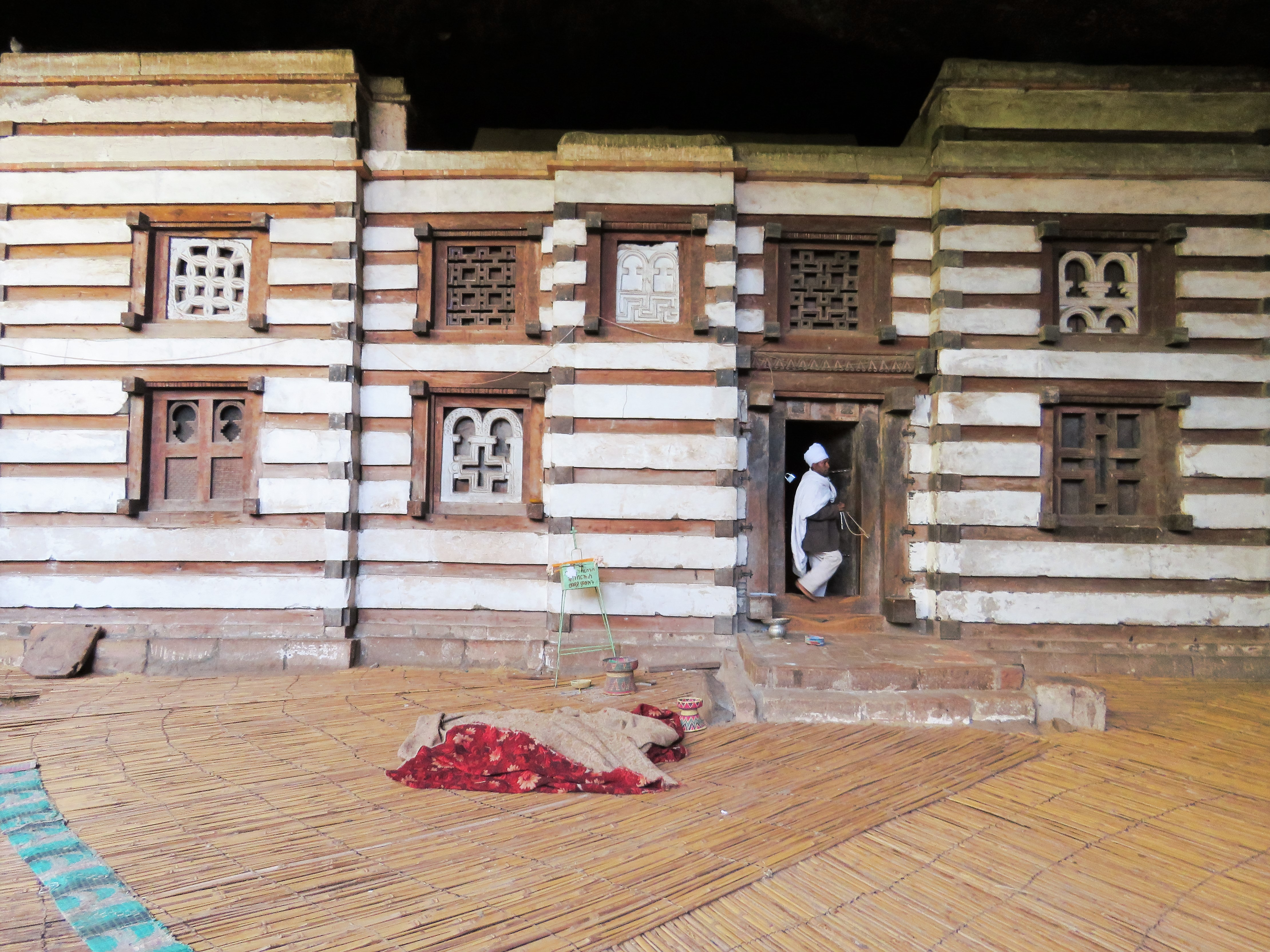 Yemrehanna Kristos 34